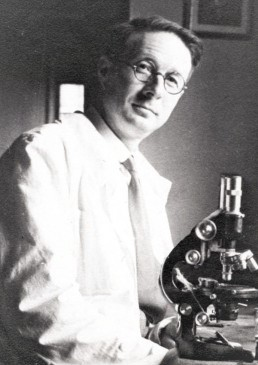 Photo Richard Maire (Collection personnelle)